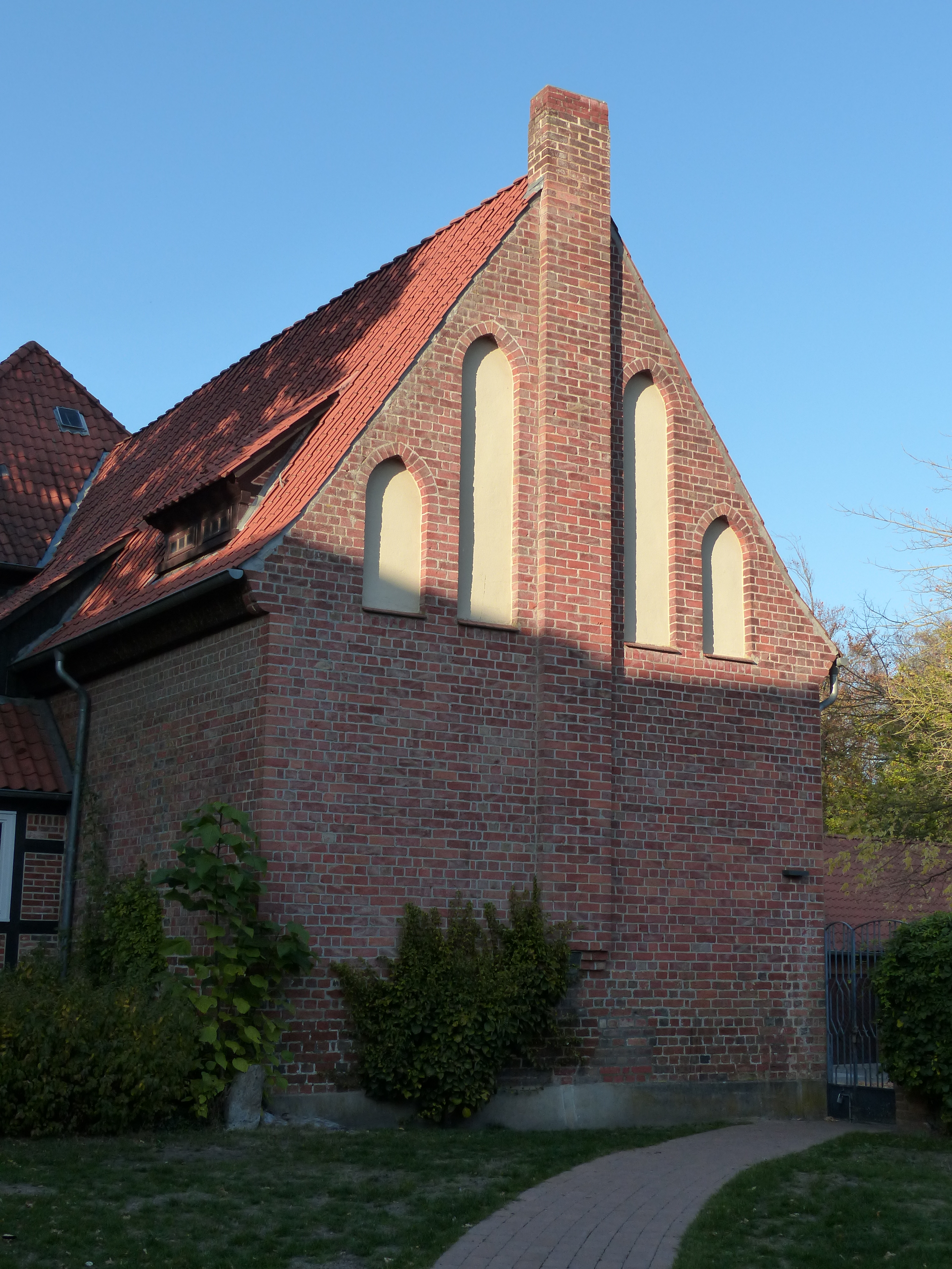 Neugotischer Remter von 1910 im Kloster Walsrode